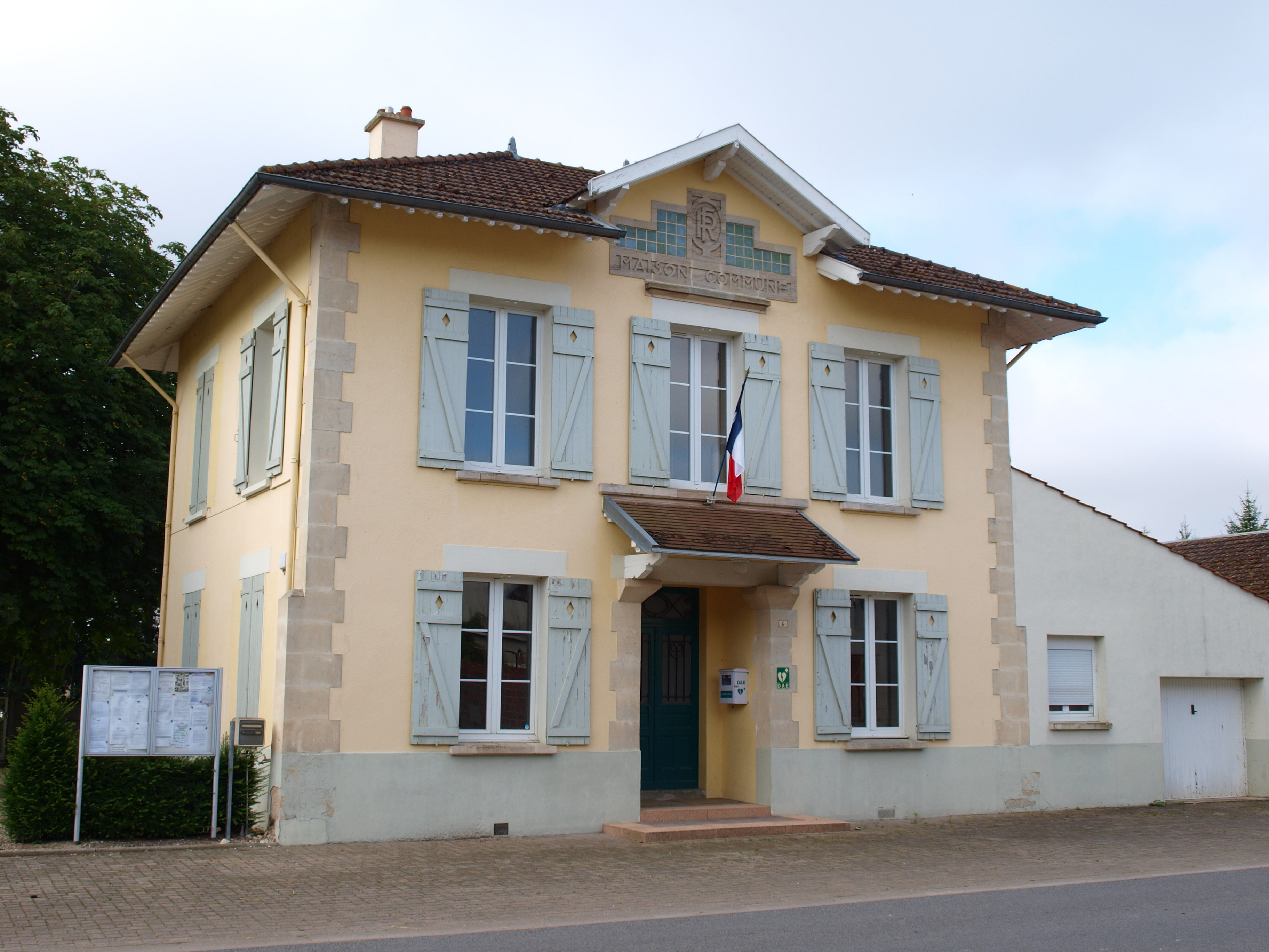 Cuperly (Marne, France)